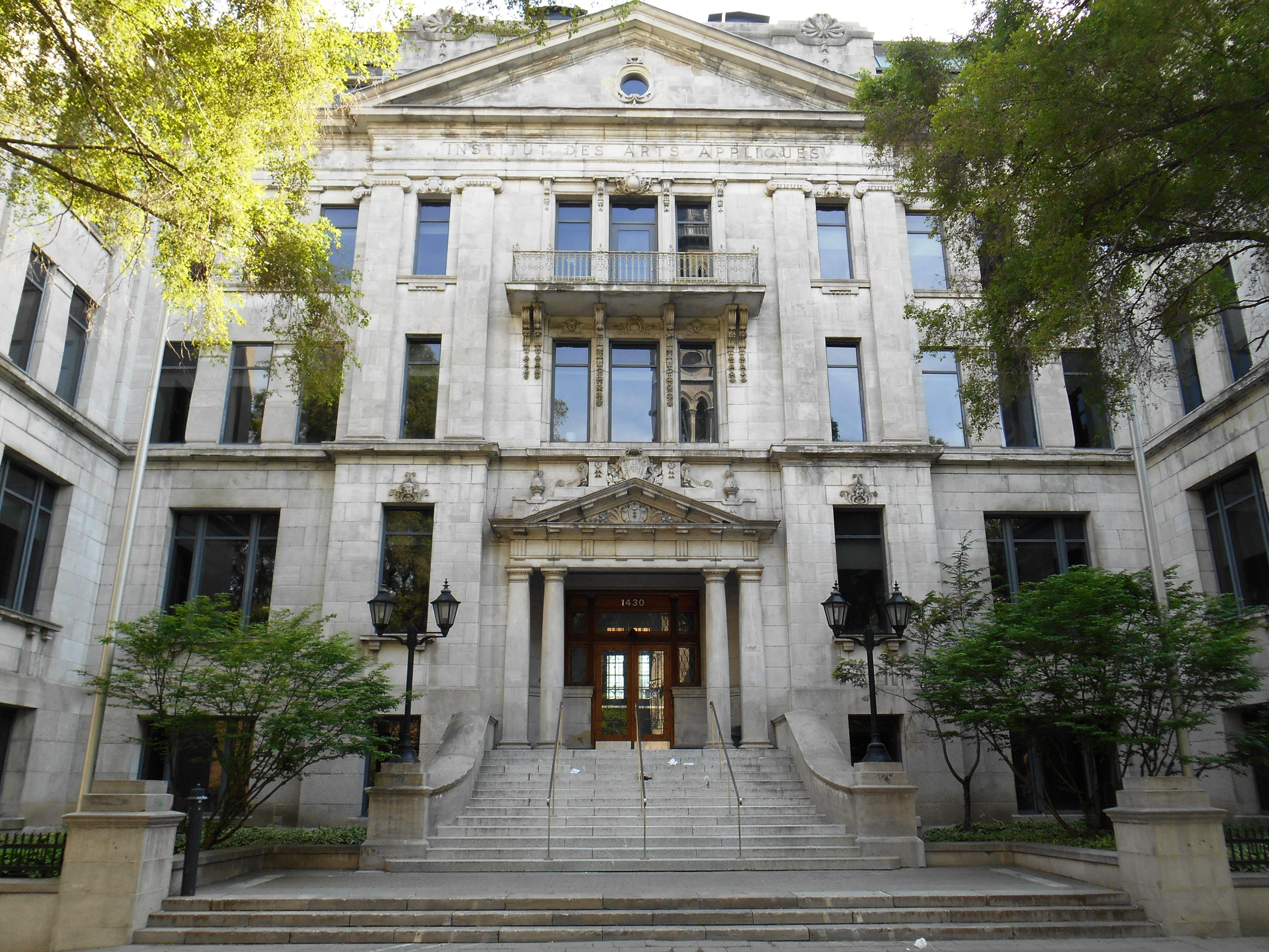 Pavillon Athanase-David de l’Université du Québec à Montréal, 1430 rue Saint-Denis. - info. Ancienne École Polytechnique de Montréal. Architecte: Joseph-Émile Vanier.